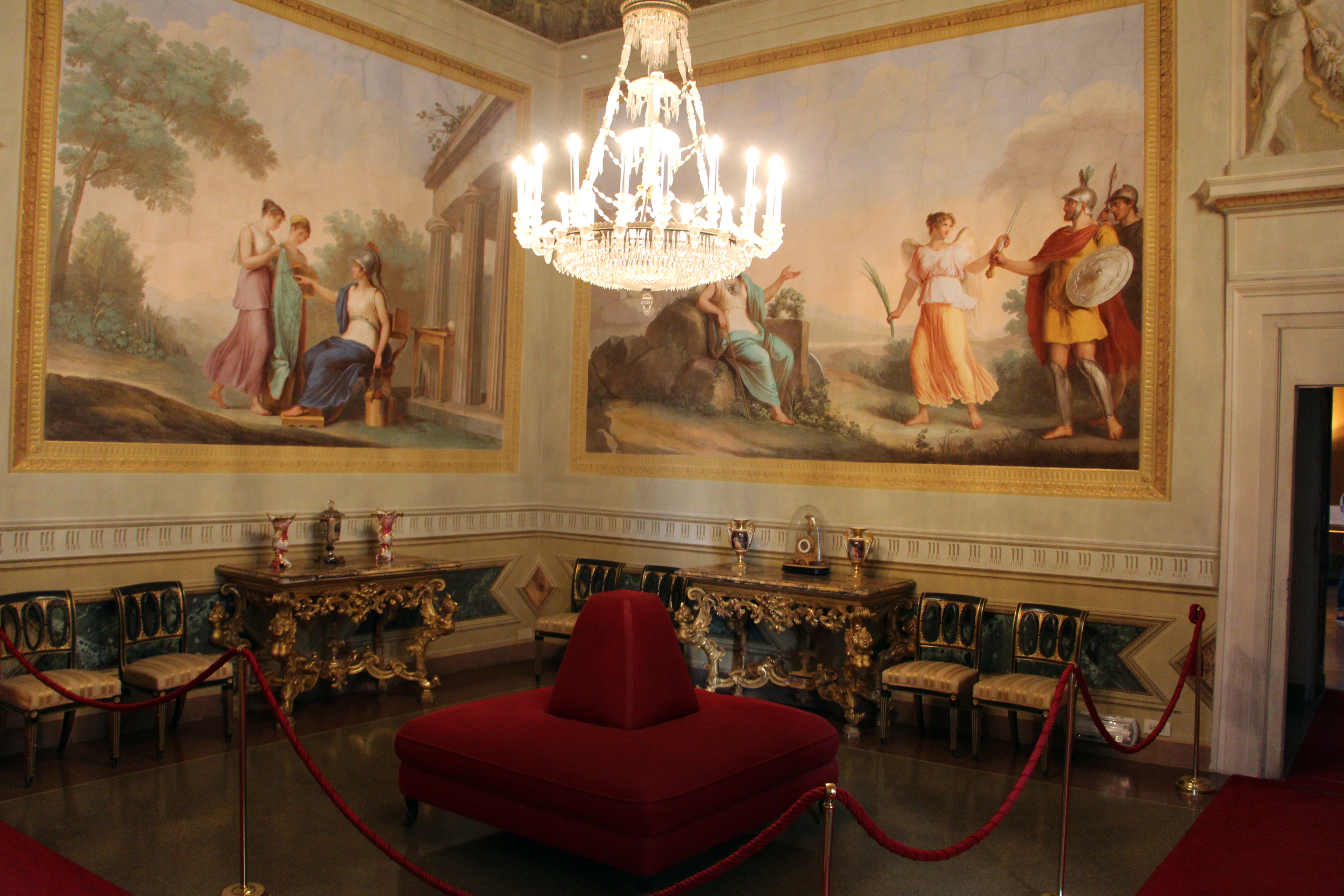 Villa medicea di Poggio a Caiano - MIBAC The making of this document was supported by Wikimedia CH. (Submit your project!) For all the files concerned, please see the category Supported by Wikimedia CH. This is a photo of a monument which is part of cultural heritage of Italy.